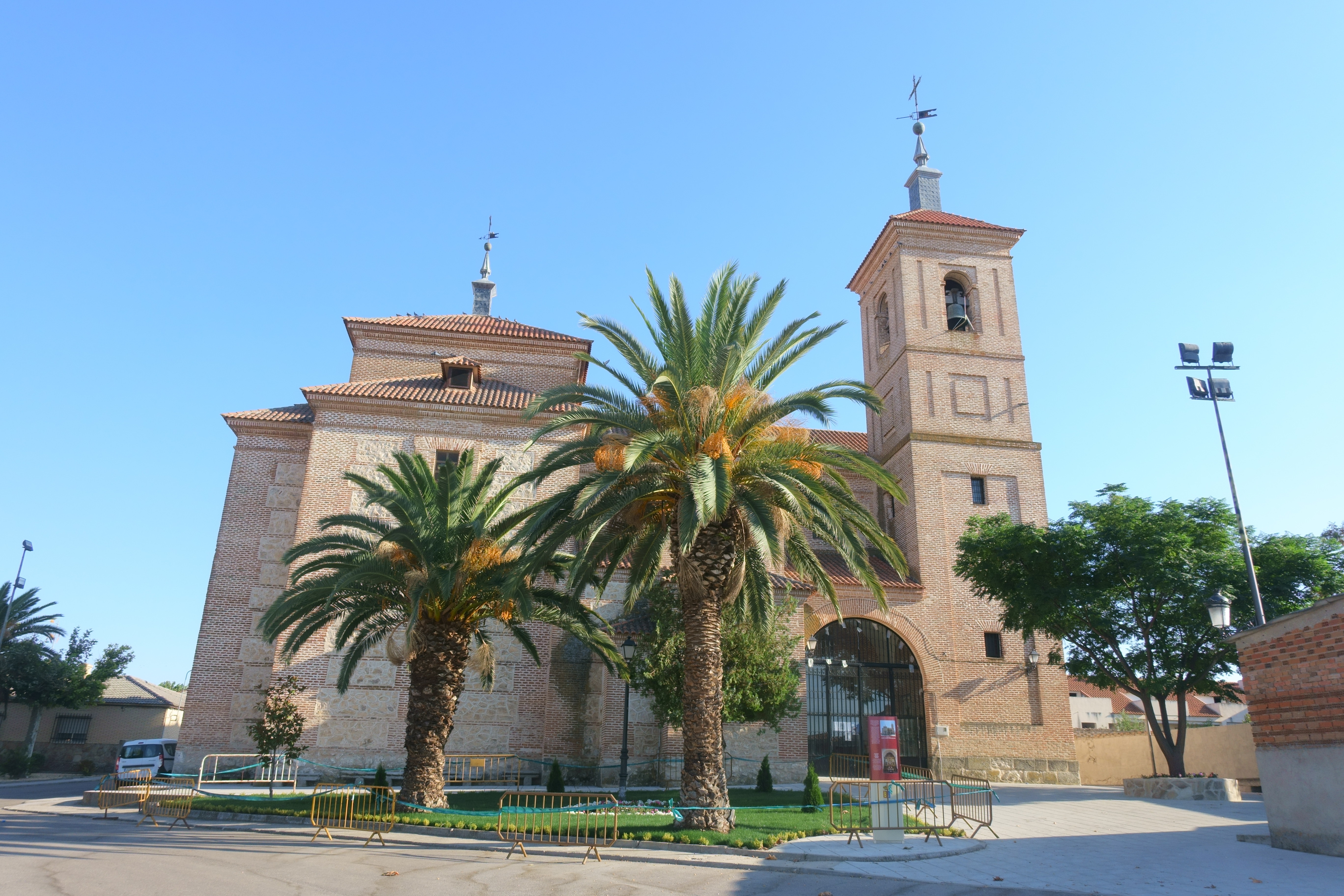 Iglesia de Santo Tomás Cantuariense, Alcabón (Toledo, España).